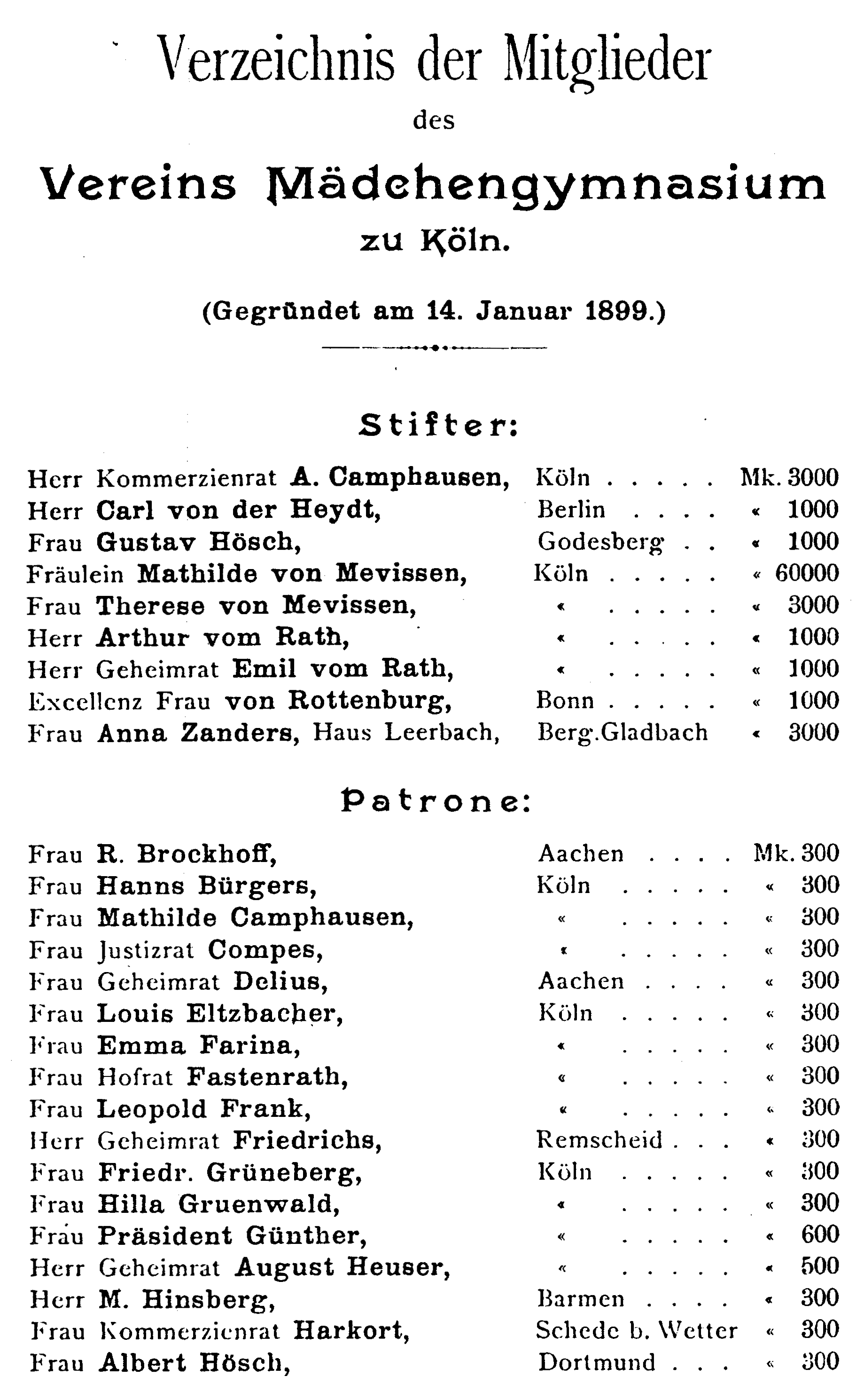 Mitgliederverzeichnis der Mitglieder des Vereins Mädchengymnasium zu Köln von 1903